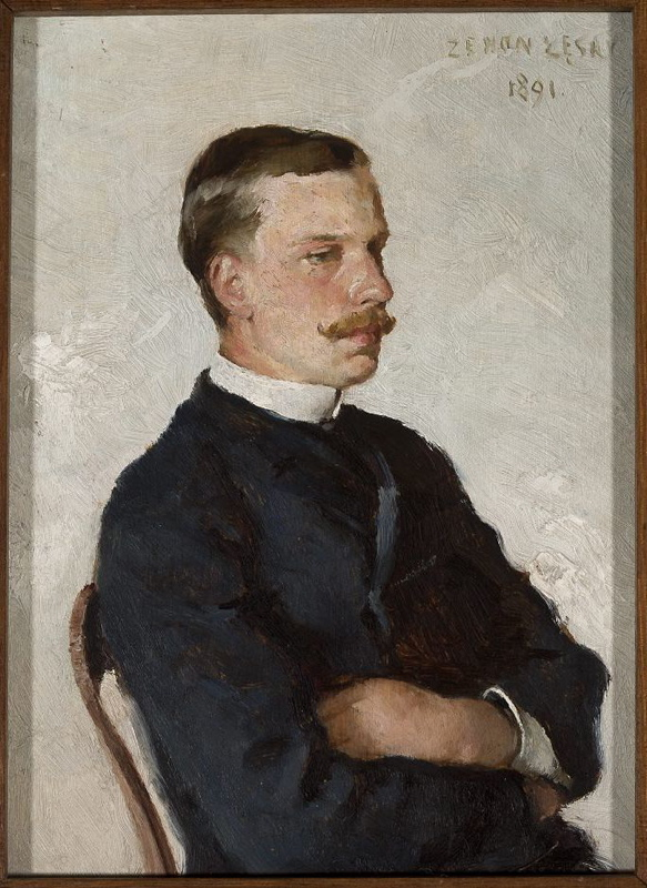 Ленскі Зянон. Аўтапартрэт. 1891. Дошка, алей. 18 х 13,5. Нацыянальны музей у Варшаве